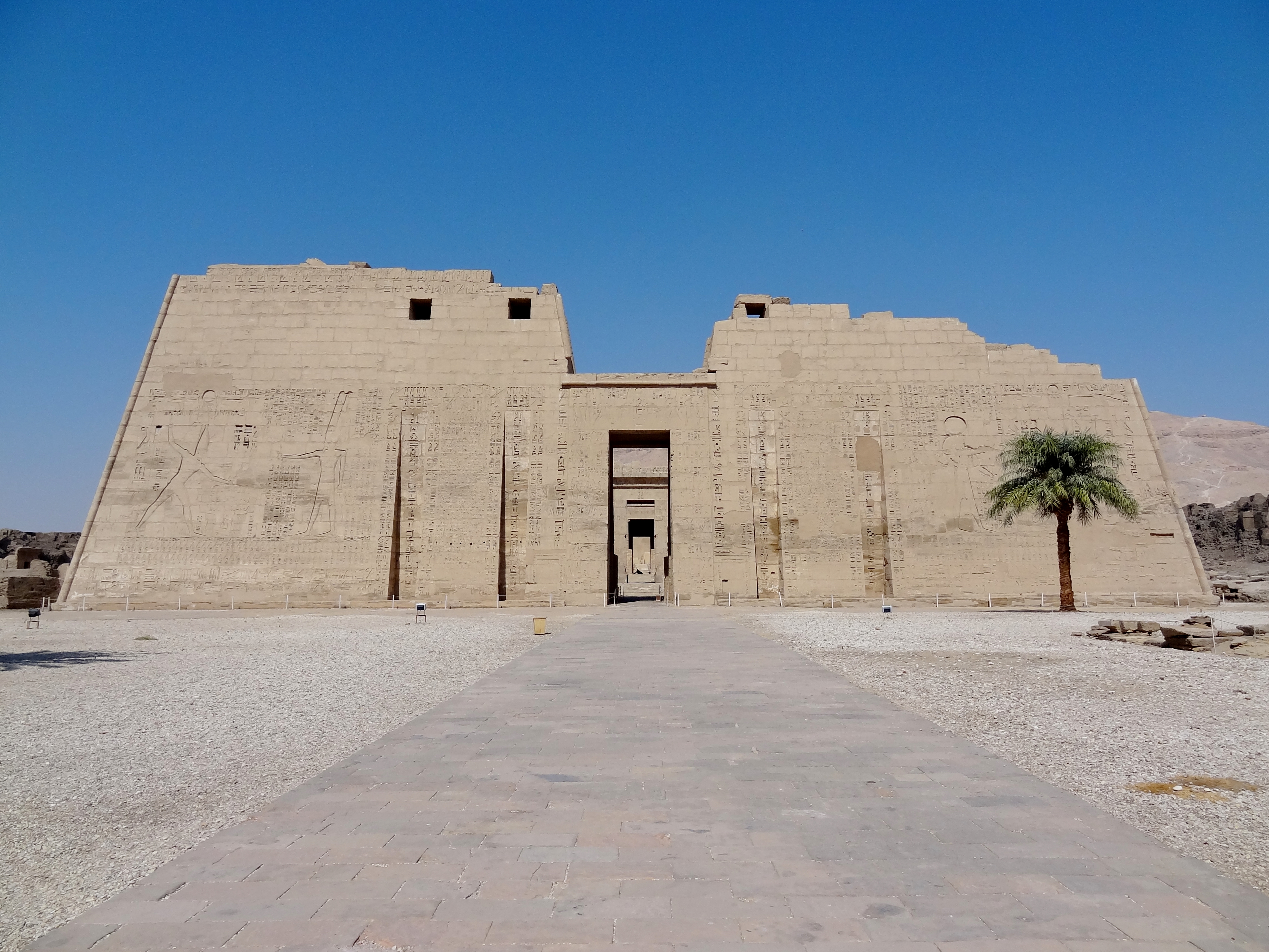 Erster Pylon des Totentempels Ramses’ III. in Medinet Habu, Ägypten